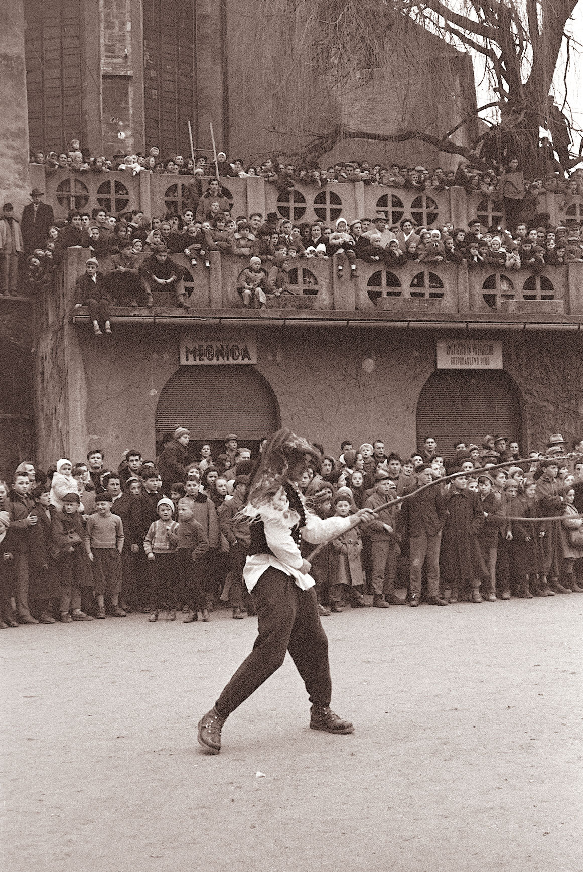 Veliko kurentovanje na Ptuju.